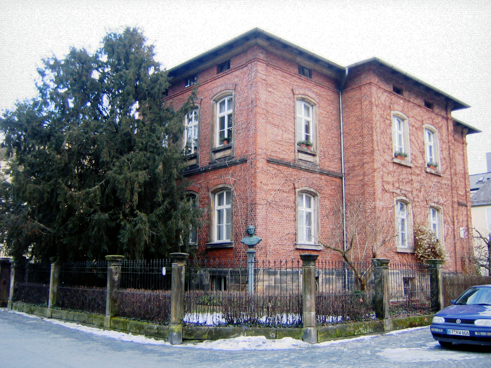 Bayreuth, Wahnfriedstr. 9, Sterbehaus von Franz Liszt, heute Franz-Liszt-Museum.